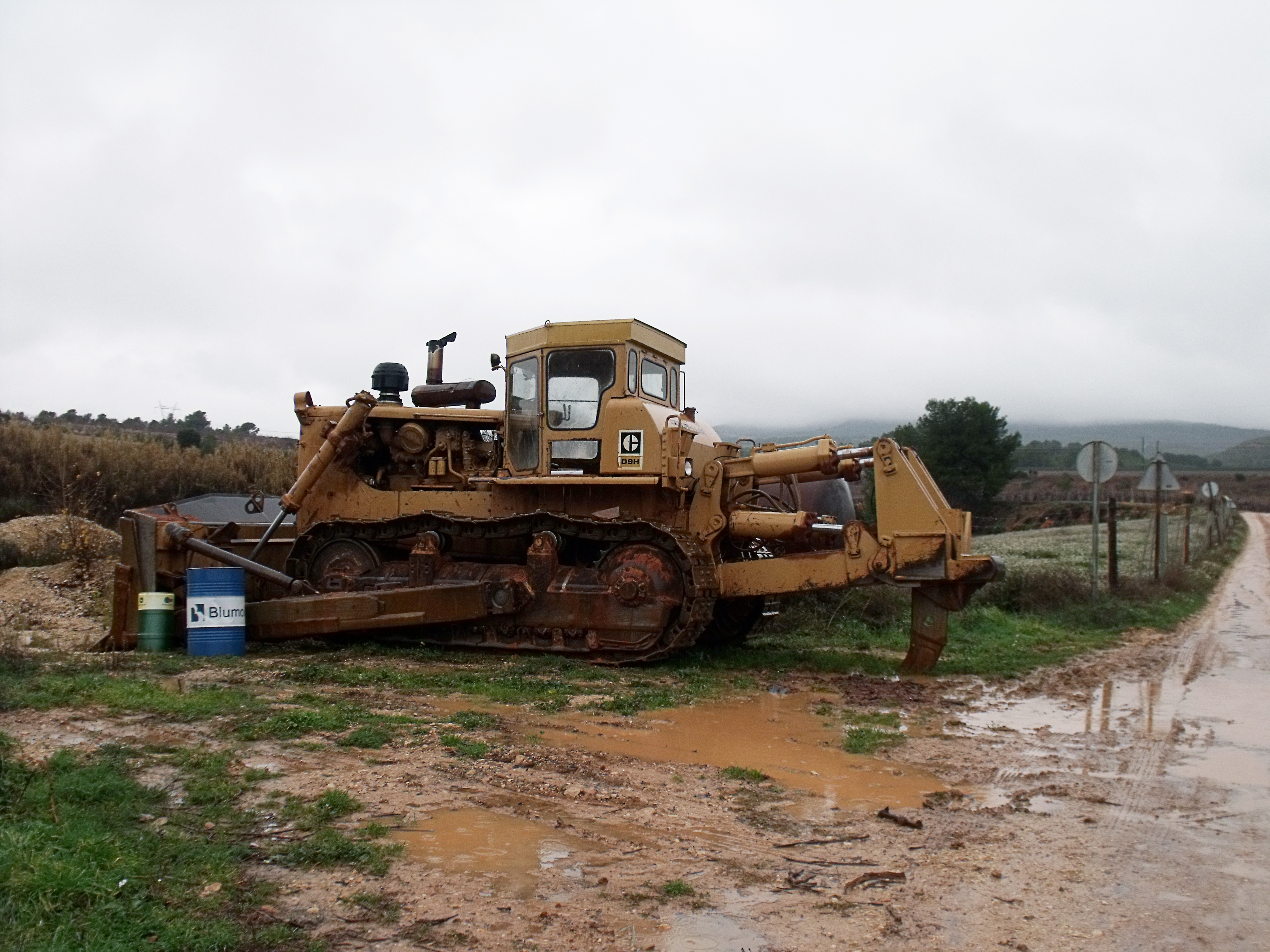 Caterpillar D9H cerca de El Rebollar (Requena)